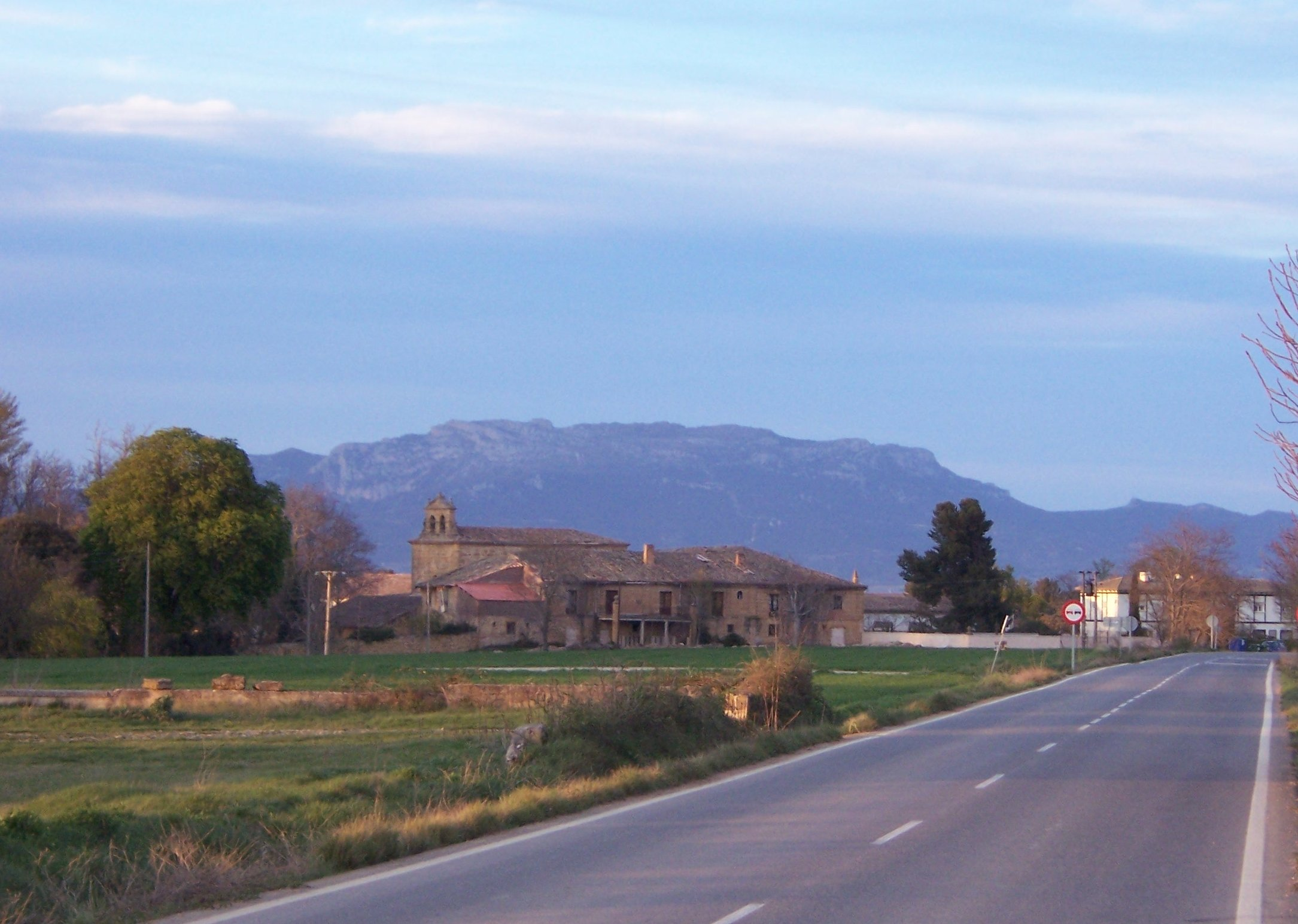 Panorámica de Cidamón, municipio de La Rioja - España